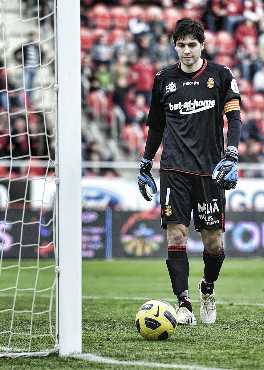 Germán Lux con el Mallorca